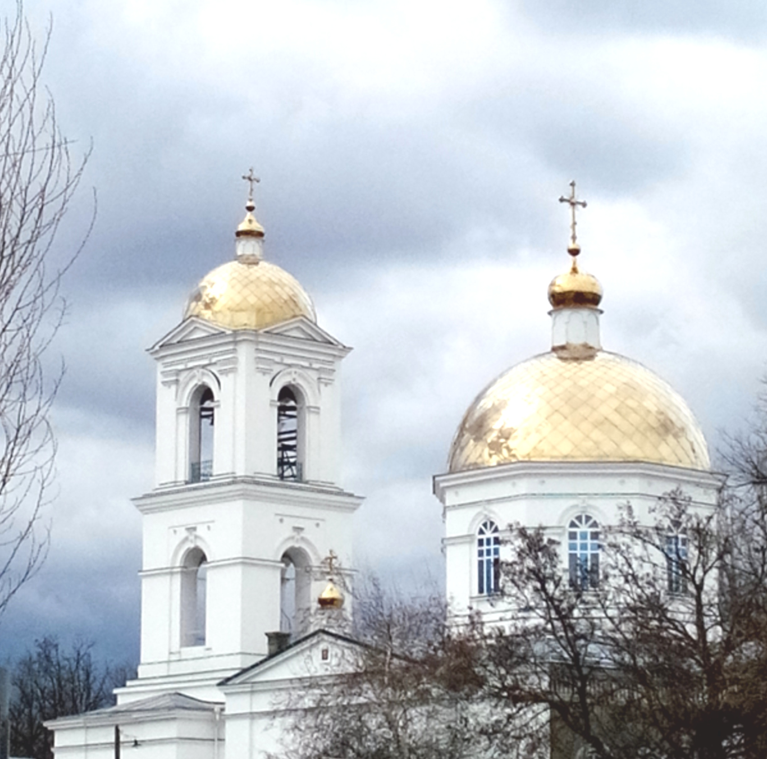 Херсон